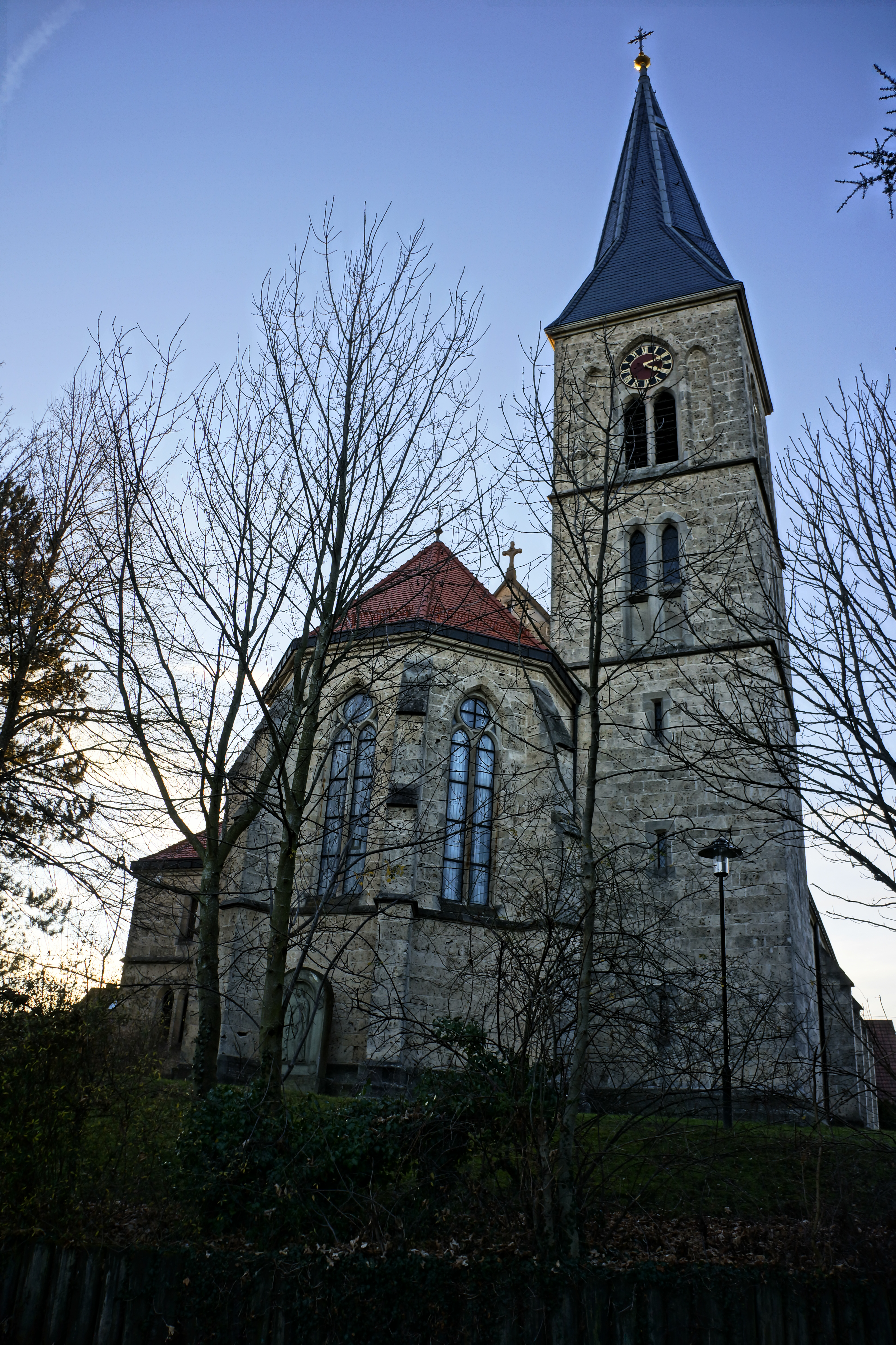 Iglesia de San Martinus en Dotternhausen (Kreis de Zollernalb, Baden-Württemberg, Alemania)